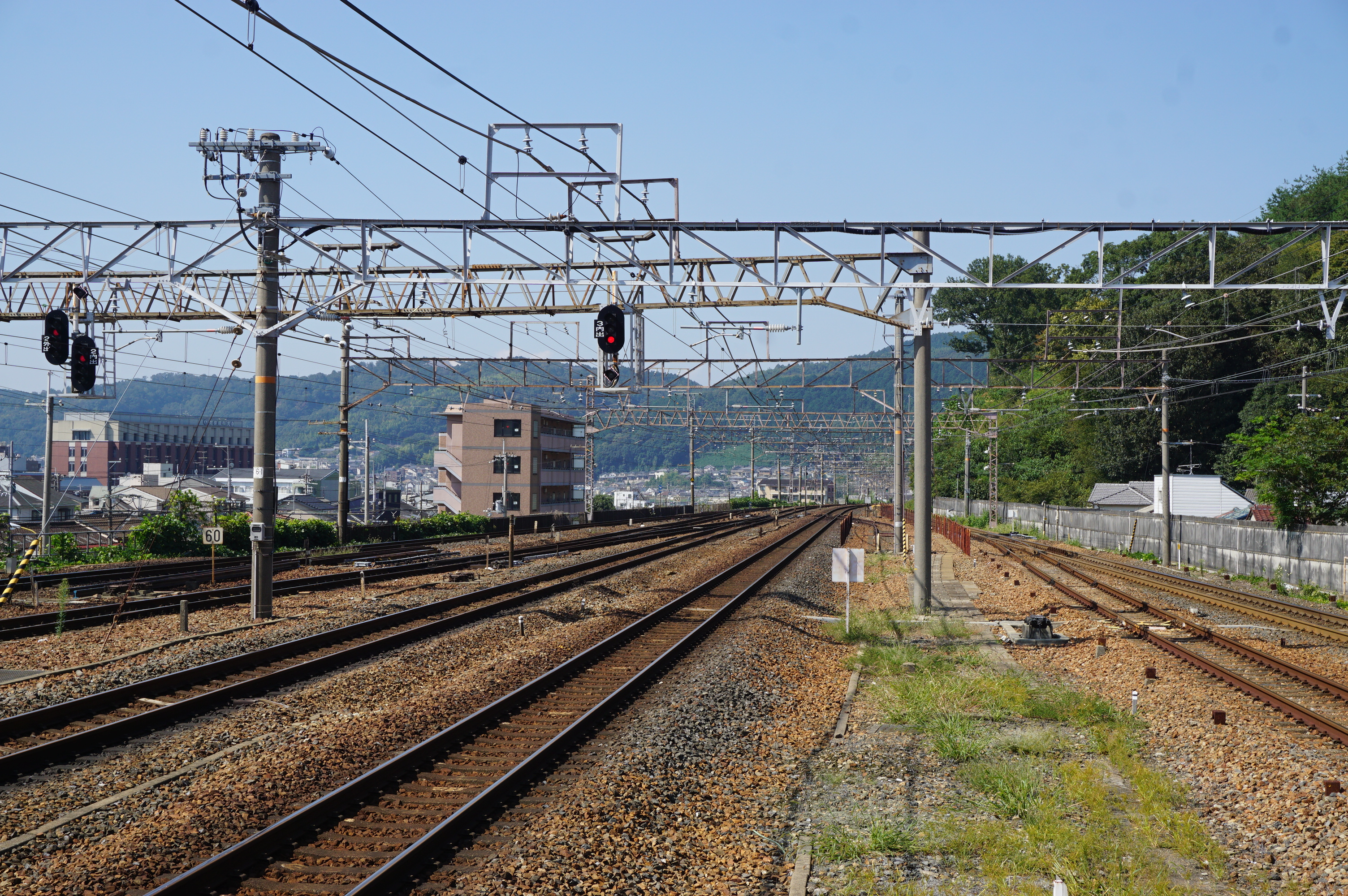 駅西側にある分岐線の準備 Sony ILCE-6000